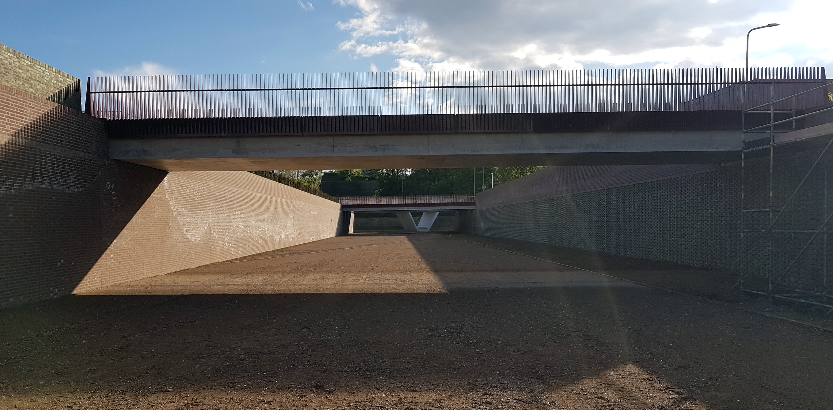 Zicht op een vijftal verkeers-, fiets- en voetgangersbruggen nabij de Cabergerweg in Maastricht. De bruggen zijn onderdeel van de nieuw aangelegde droge gracht tussen de Hoge en Lage Fronten (eigenlijk: Linie van Dumoulin en Nieuwe Bossche Fronten), die twee losse delen van het Frontenpark met elkaar verbindt.